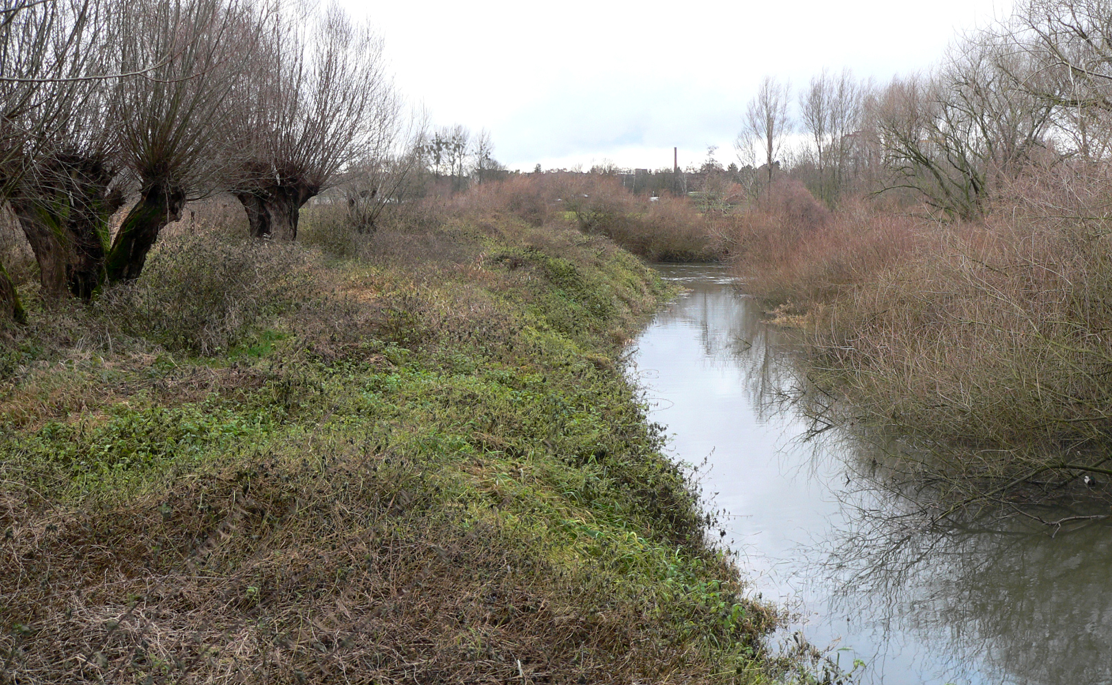 Ernst-August-Kanal mit Mündung in die Leine